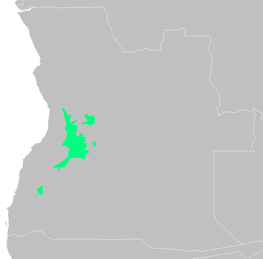 Angolan montane forest-grassland mosaic ecoregion map